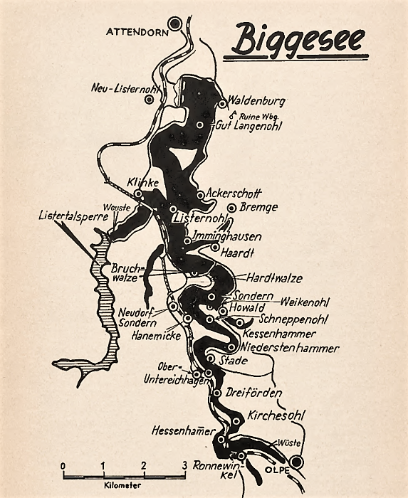 Karte der beim Bau der Biggetalsperre (1956–1965) zwischen Attendorn und Olpe untergegangenen Ortschaften.